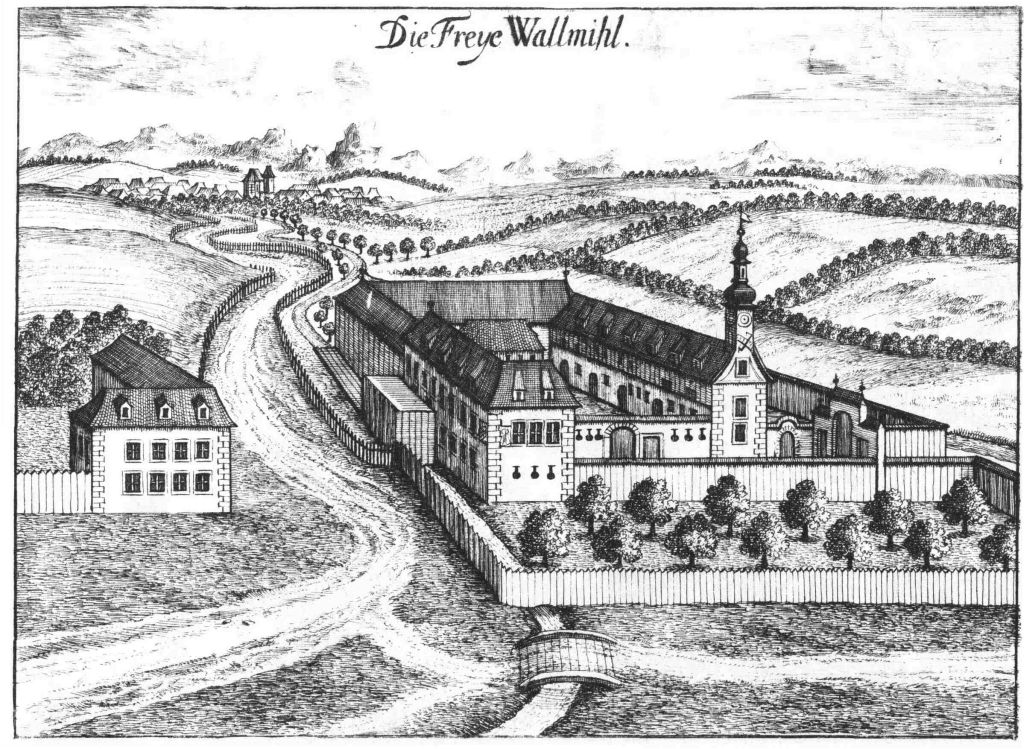 Freye Walmihl nach einem Stich von Georg Matthäus Vischer von 1674